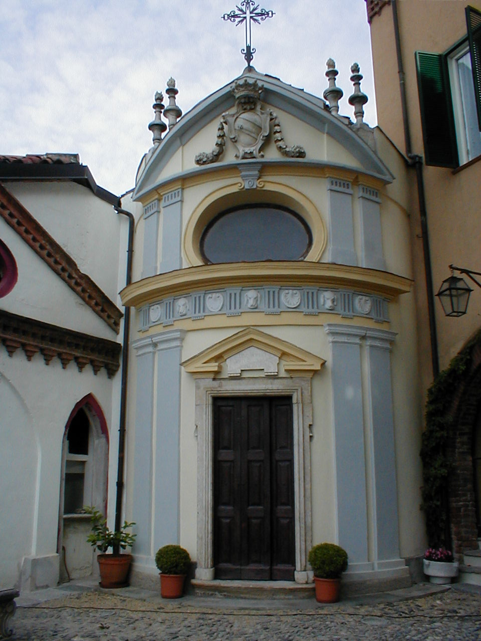 Ingresso della cappella di San Rocco a Trofarello